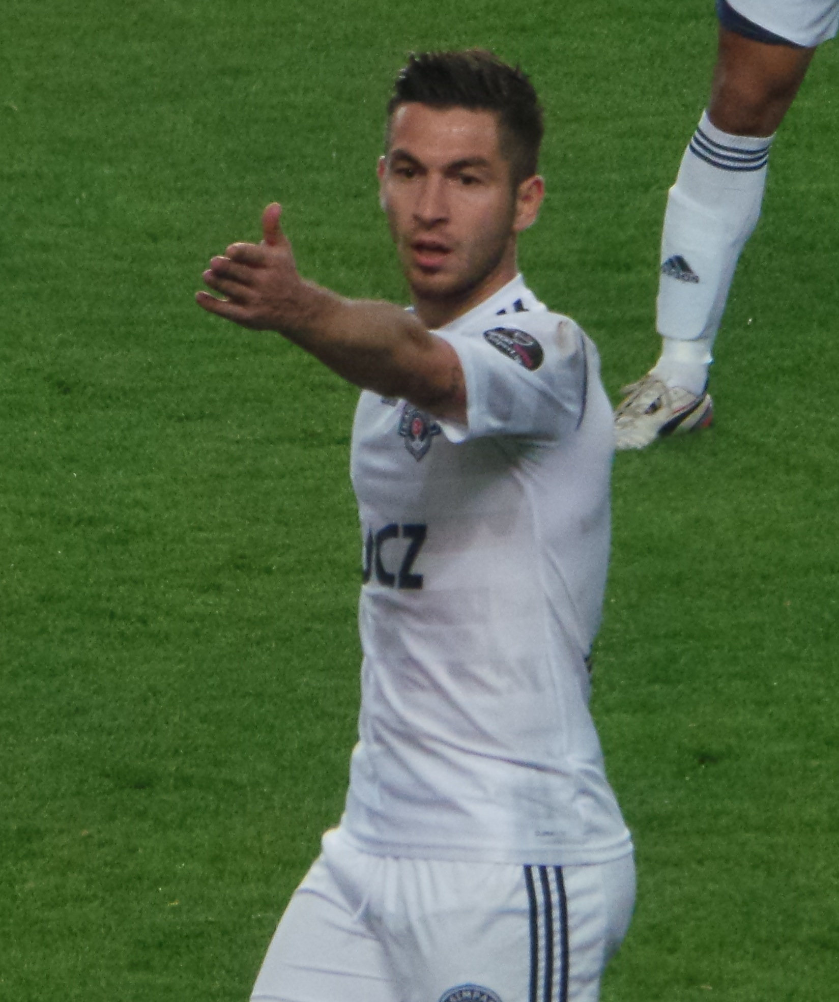 Adem Büyük fb maçında